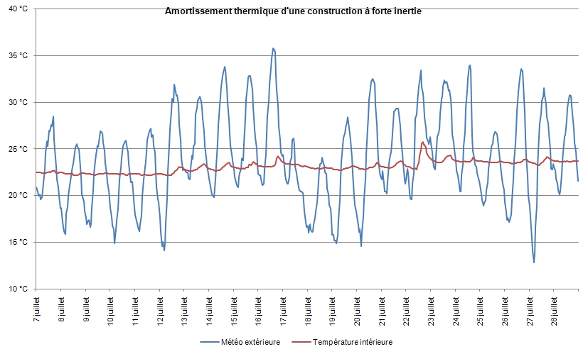 Amortissement thermique dans une construction à forte inertie (sud Ardèche - année 2009 - murs en pierre de 50 cm d'épaisseur)